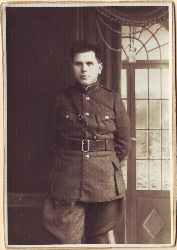 Stasys Šimkus in military uniform